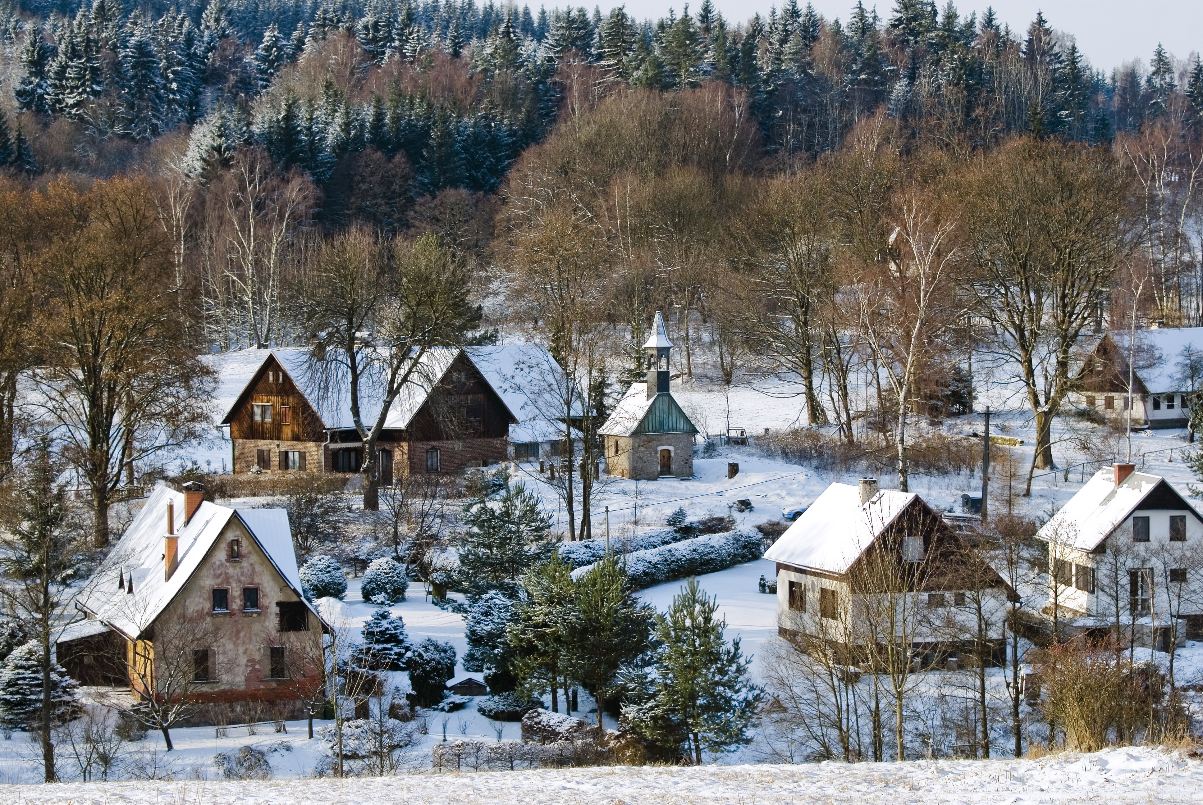 Rybníček